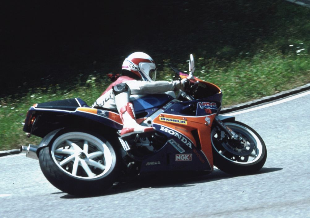 Honda VFR750R (RC30)